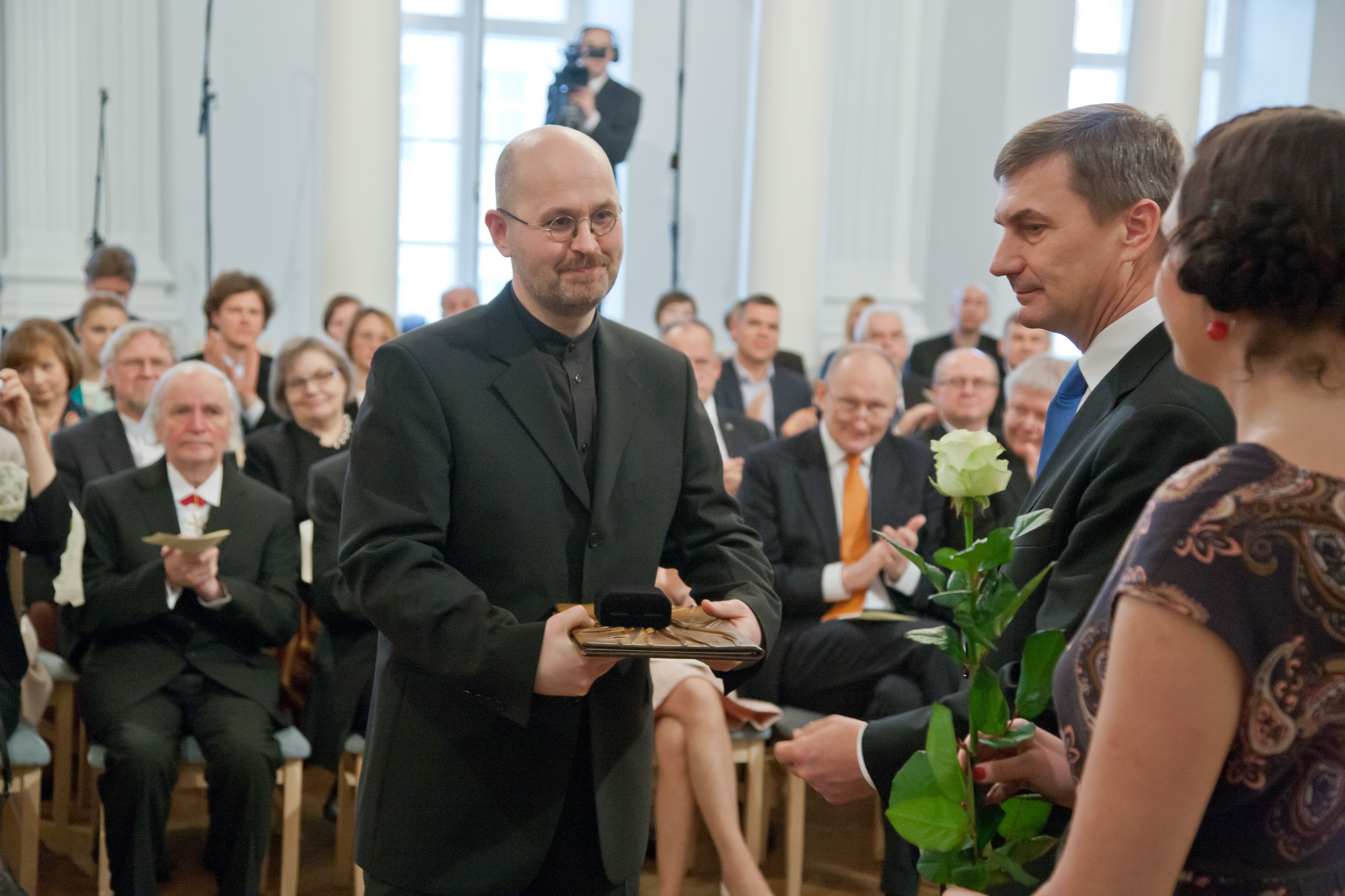 Eesti Vabariigi teaduspreemiate, F. J. Wiedemanni keeleauhinna, spordi- ja kultuuripreemiate kätteandmine 24. veebruaril 2012. aastal Tartu Ülikooli aulas. Pildil geo- ja bioteaduste alal preemia laureaat, Tartu Ülikooli Ökoloogia ja Maateaduste instituudi professor Kalle Kirsimäe ja peaminister Andrus Ansip.